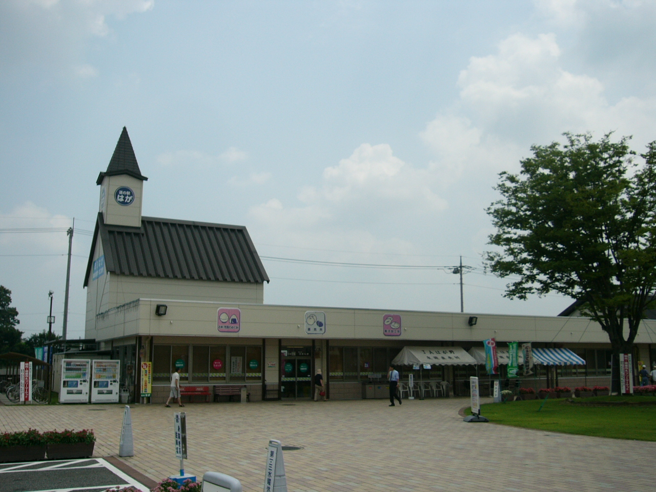 Michinoeki Haga (Tochigi) (道の駅はが)